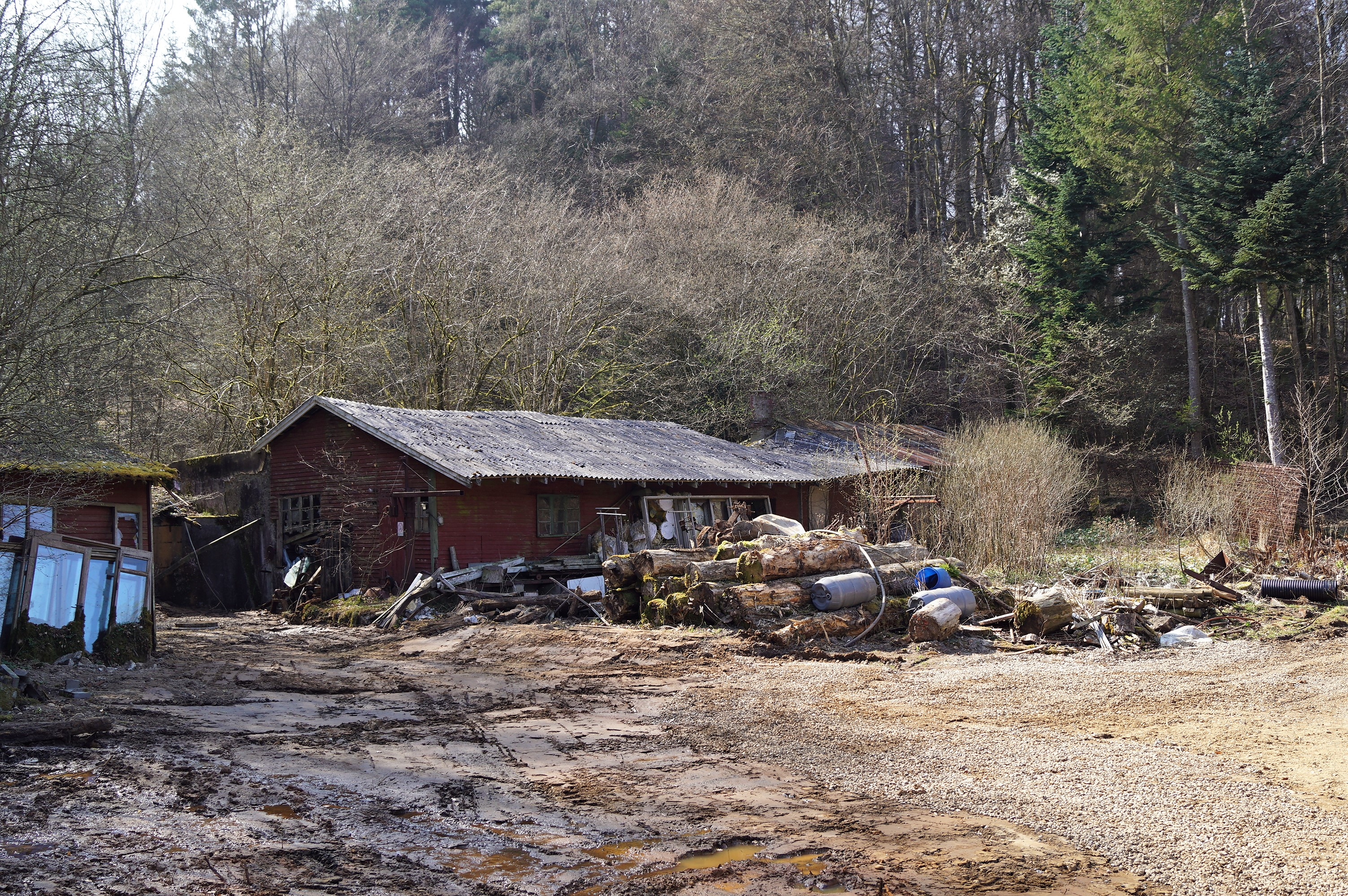 Gjessø Savværk 2018